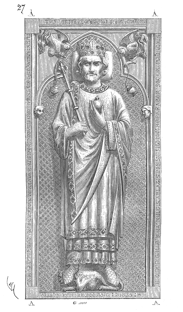 ... Tombe de Charles le Chauve, à Saint-Denis ...